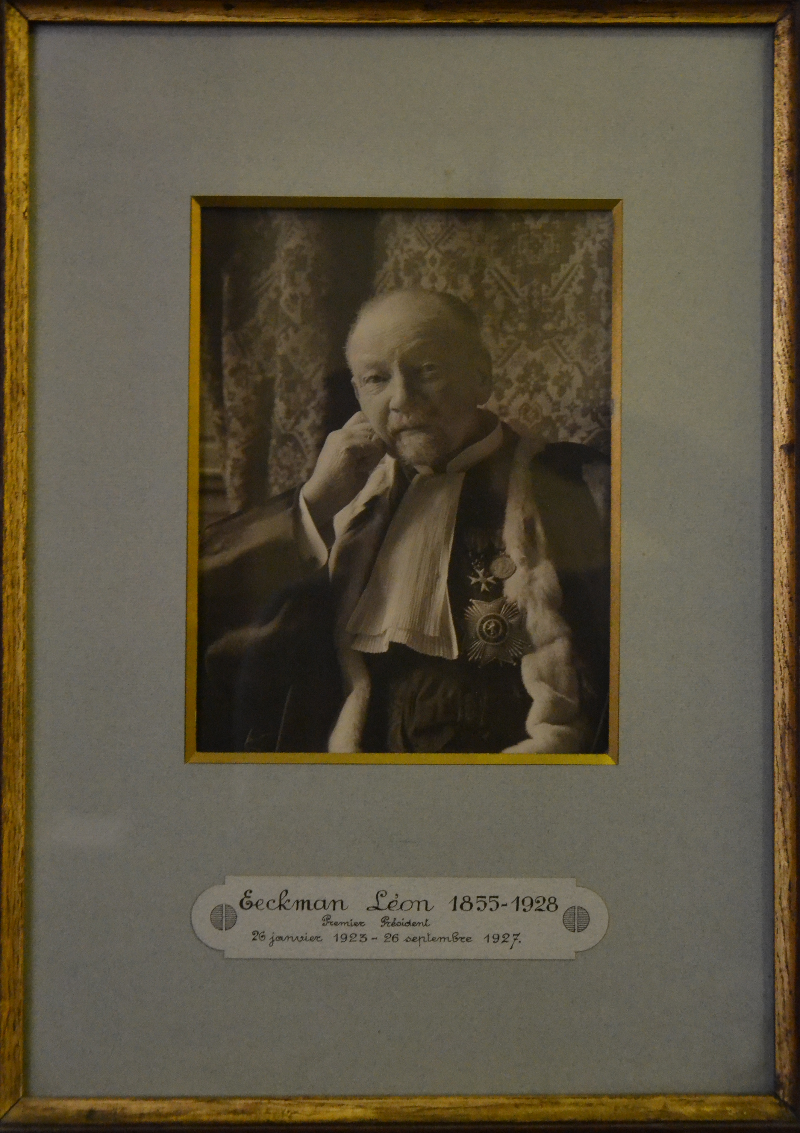 Premier président de la cour d'appel de Bruxelles (1923-1927). Ce portait pend dans la galerie des portraits des premiers présidents de la cour d'appel de Bruxelles du Palais de Justice de Bruxelles, Place Poelaert.